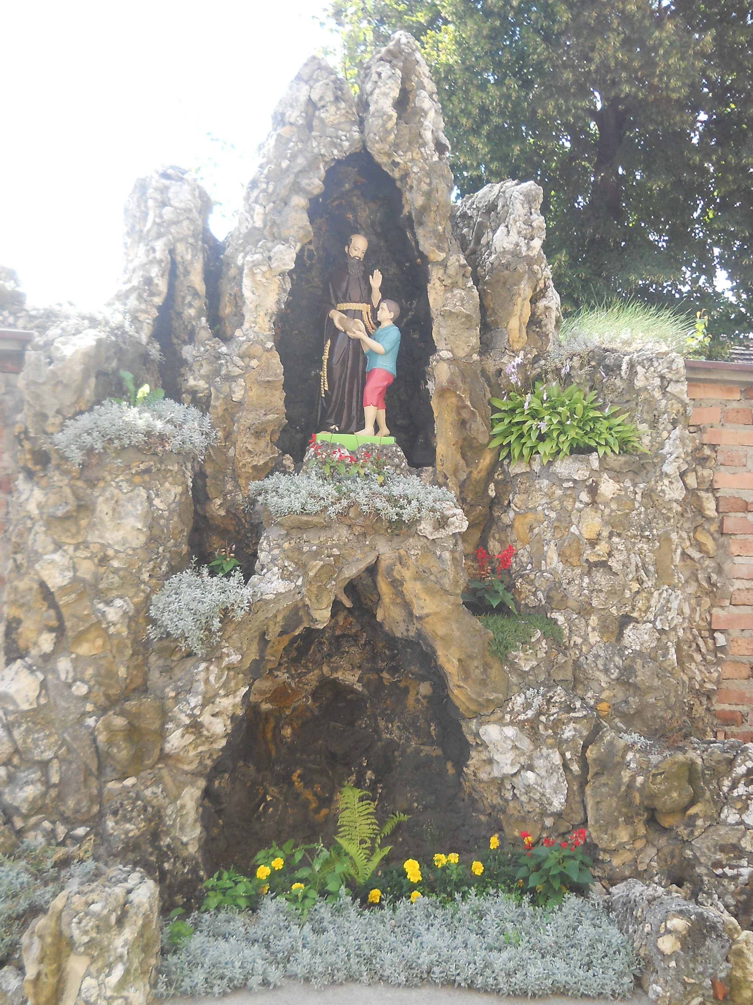 kościół par. p.w. św. Mikołaja - grota przykościelna Pyskowice, ul. Poniatowskiego